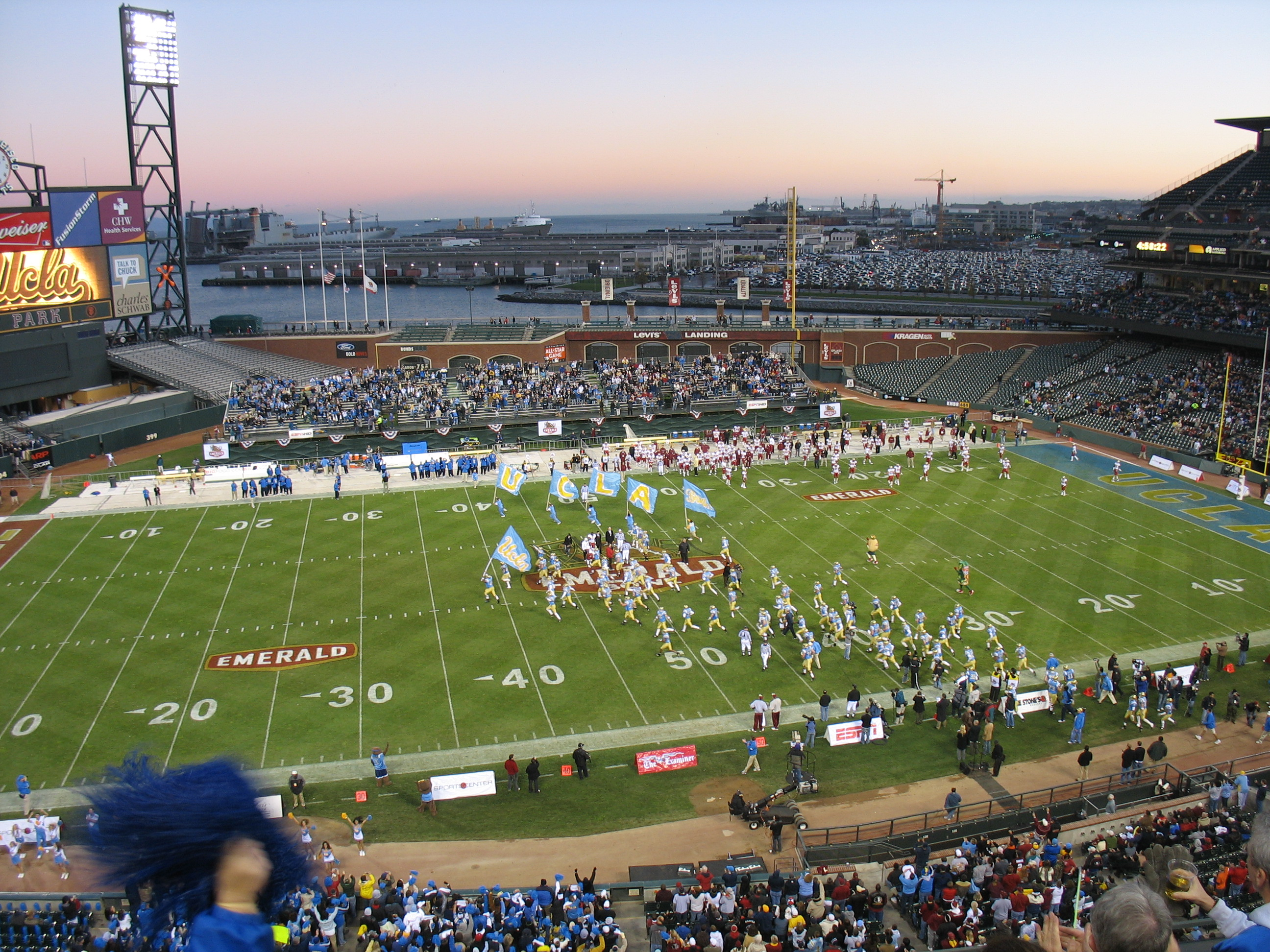 Emerald Bowl, UCLA vs FSU, 2006.jpg